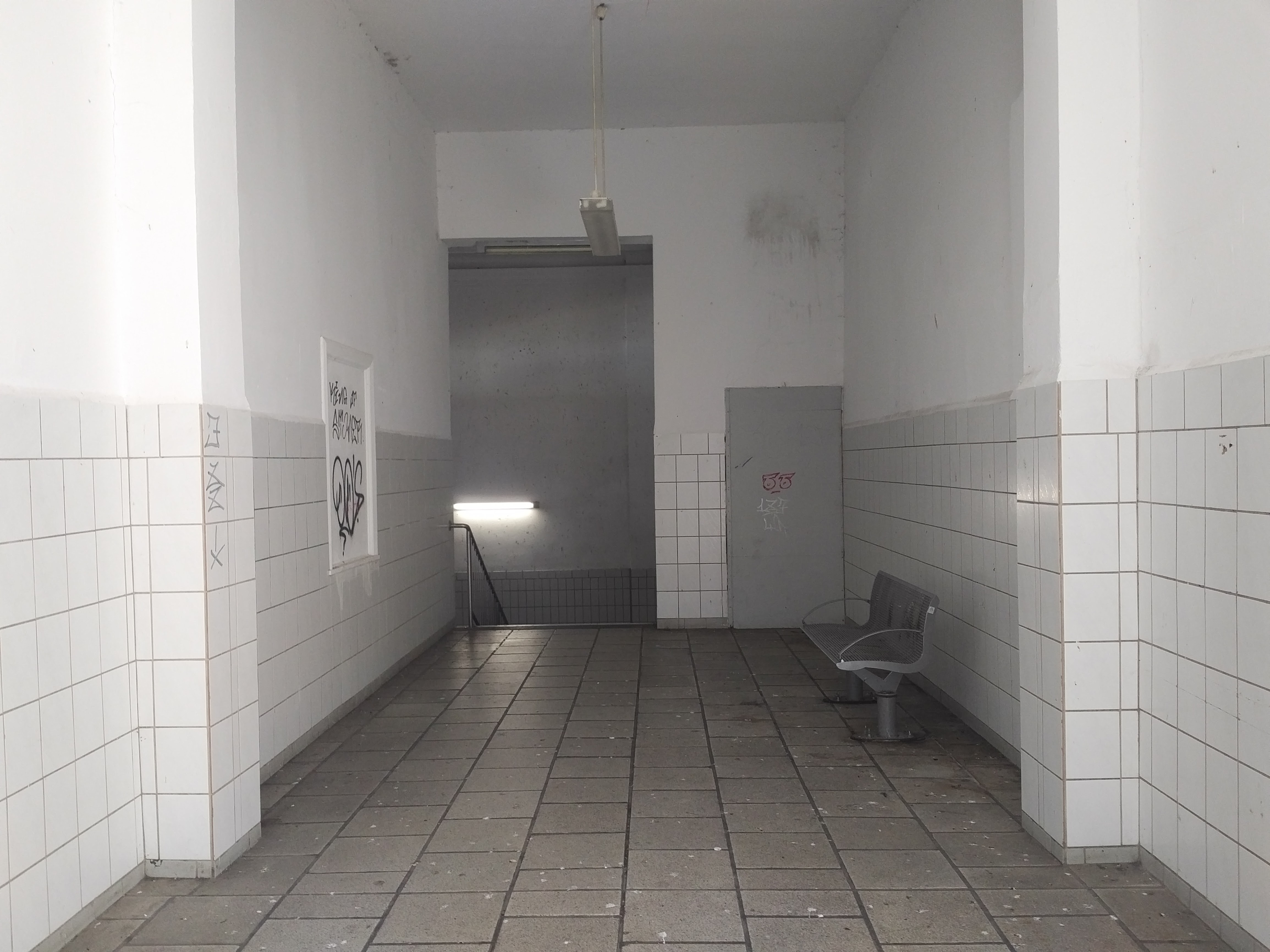 Bahnhofshalle Sandersleben